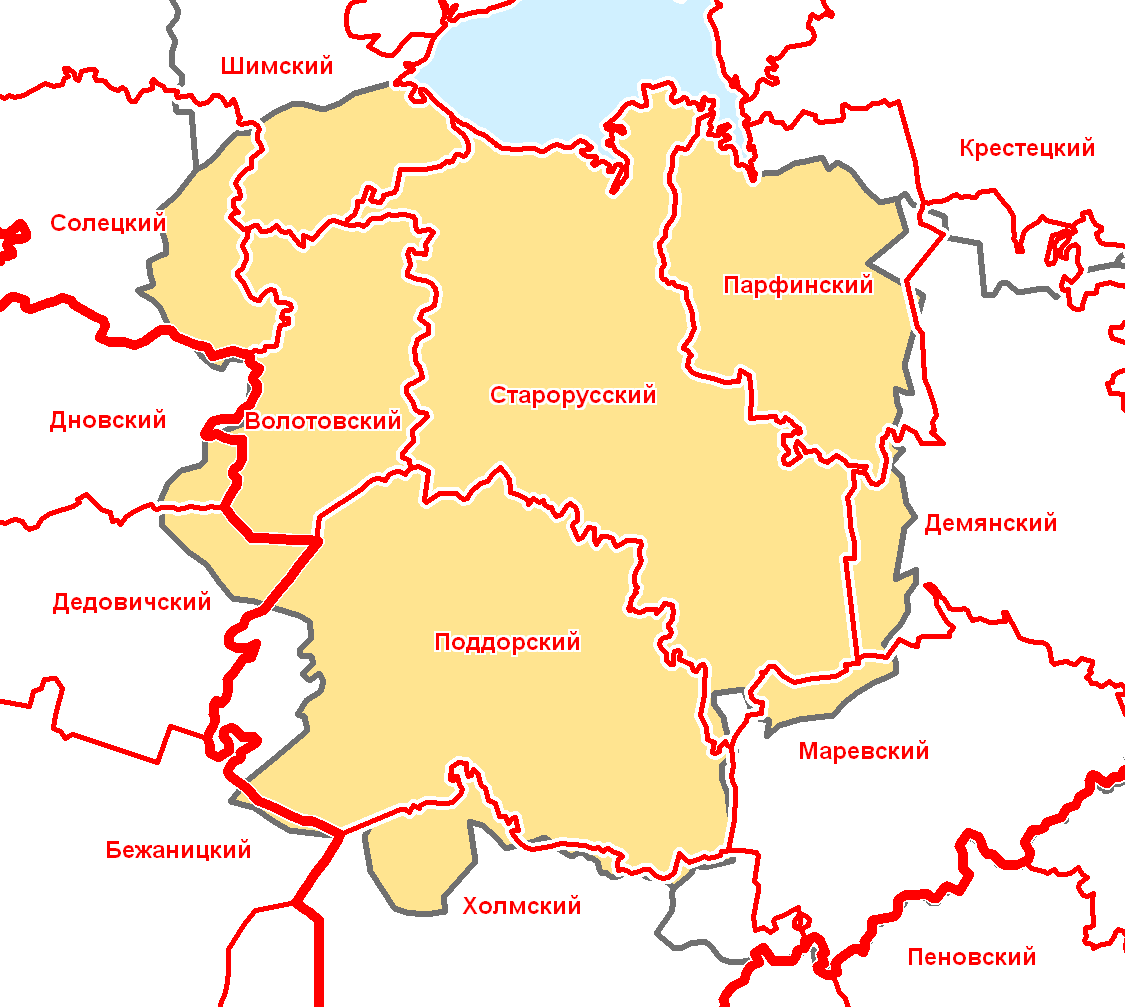 Старорусский уезд Новгородской губернии в современной сетке районов